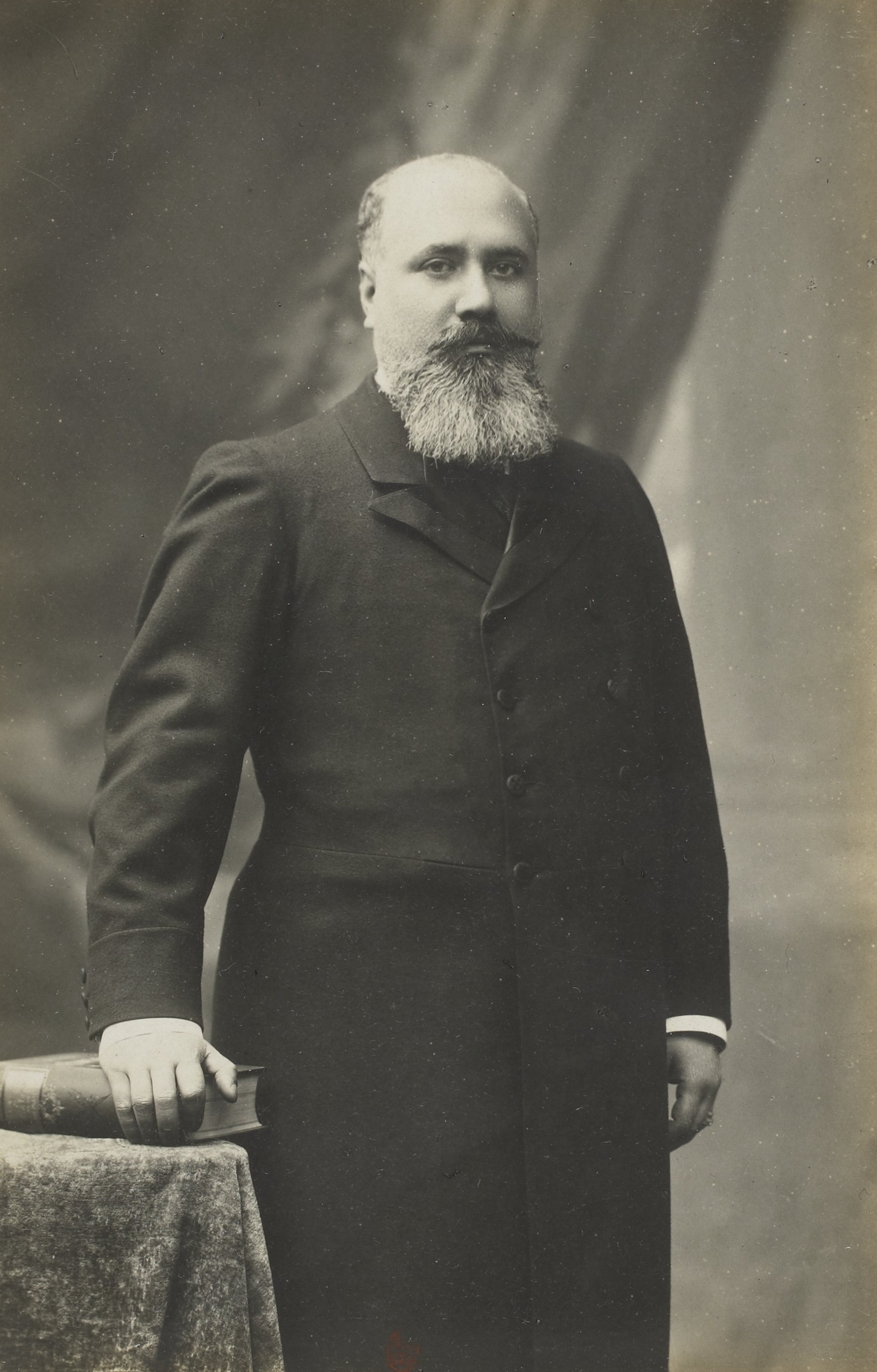 Exposition universelle de 1900 : portrait de Víctor Manuel Rendón.